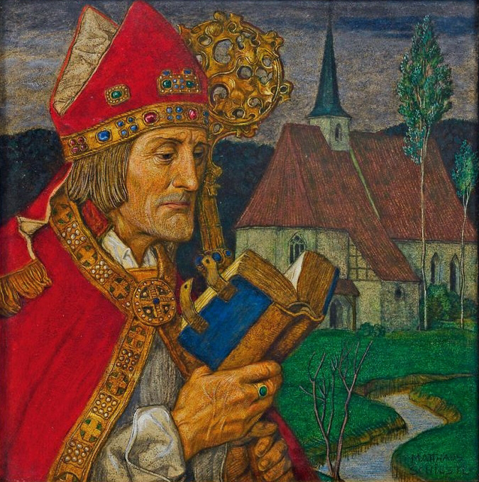 Gemälde von Matthäus Schiestl (1869-1939), Portrait des Hl. Wolfgang von Regensburg, Öl/Holztafel. R. u. sign.; 39 cm x 39 cm. Rahmen.